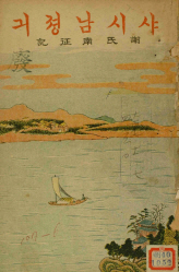 사씨남정기의 딱지본 겉표지.